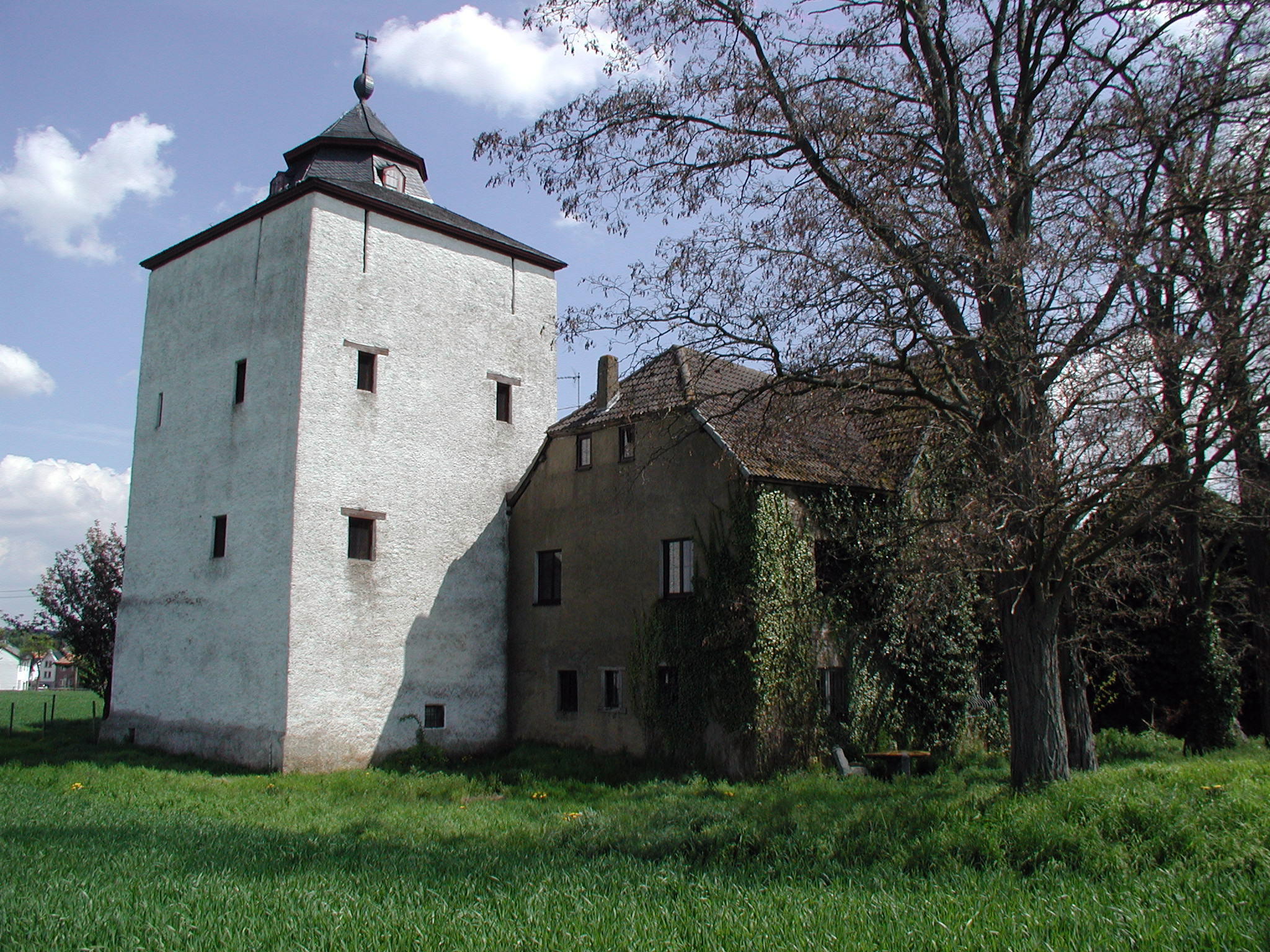 Arloff, Burgturm und Herrenhaus